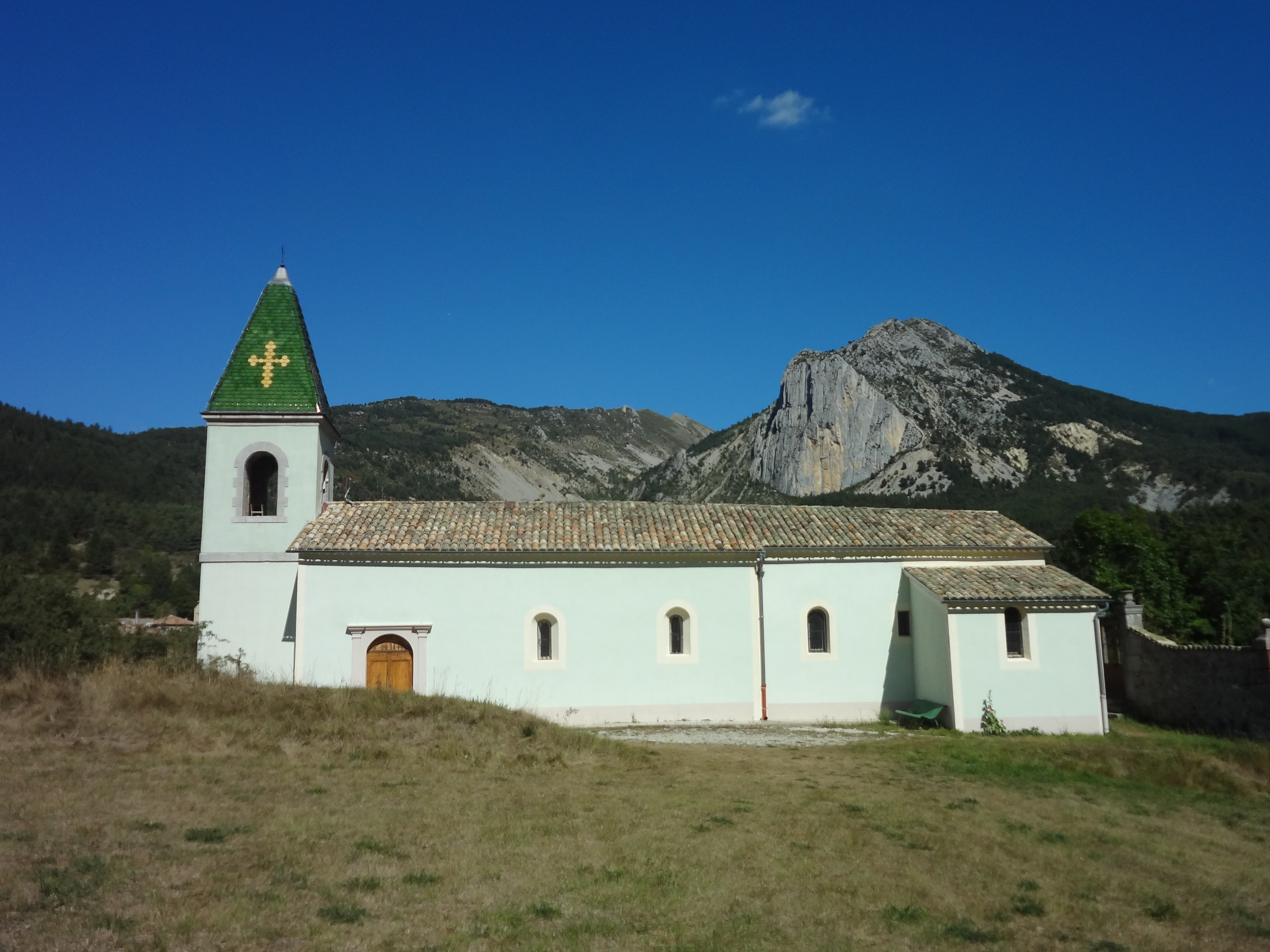 Église du XVIIe siècle, peinte en vert castellane (tiré d'une argile locale). Également placée sous le patronage de sainte Anne.